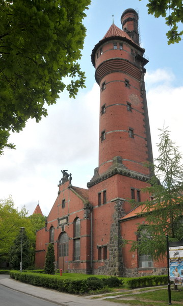 Wieża Ciśnień